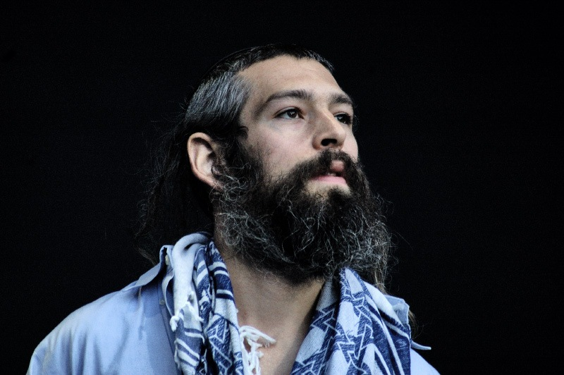 Мэтью Миллер на концерте в «Зеленом театре», Москва, 2010